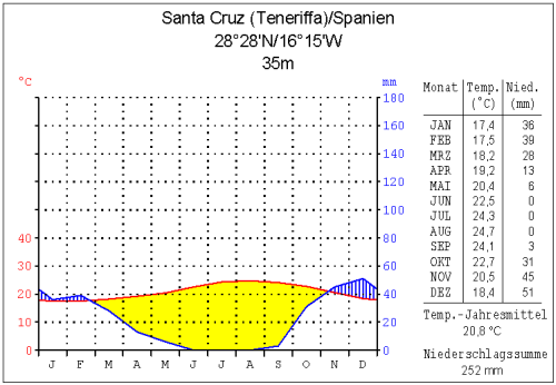 Klimadiagramm Santa Cruz de Tenerife